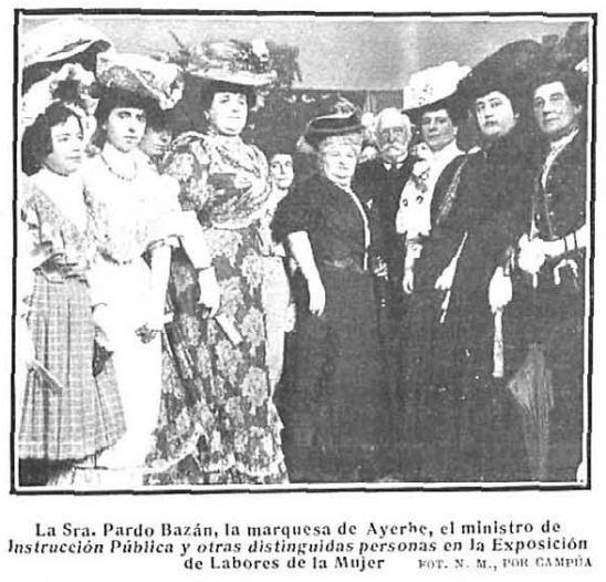 La Sra. Pardo Bazán, la marquesa de Ayerbe, el ministro de Instrucción Pública y otras distinguidas personas en la Exposición de Labores de la Mujer.